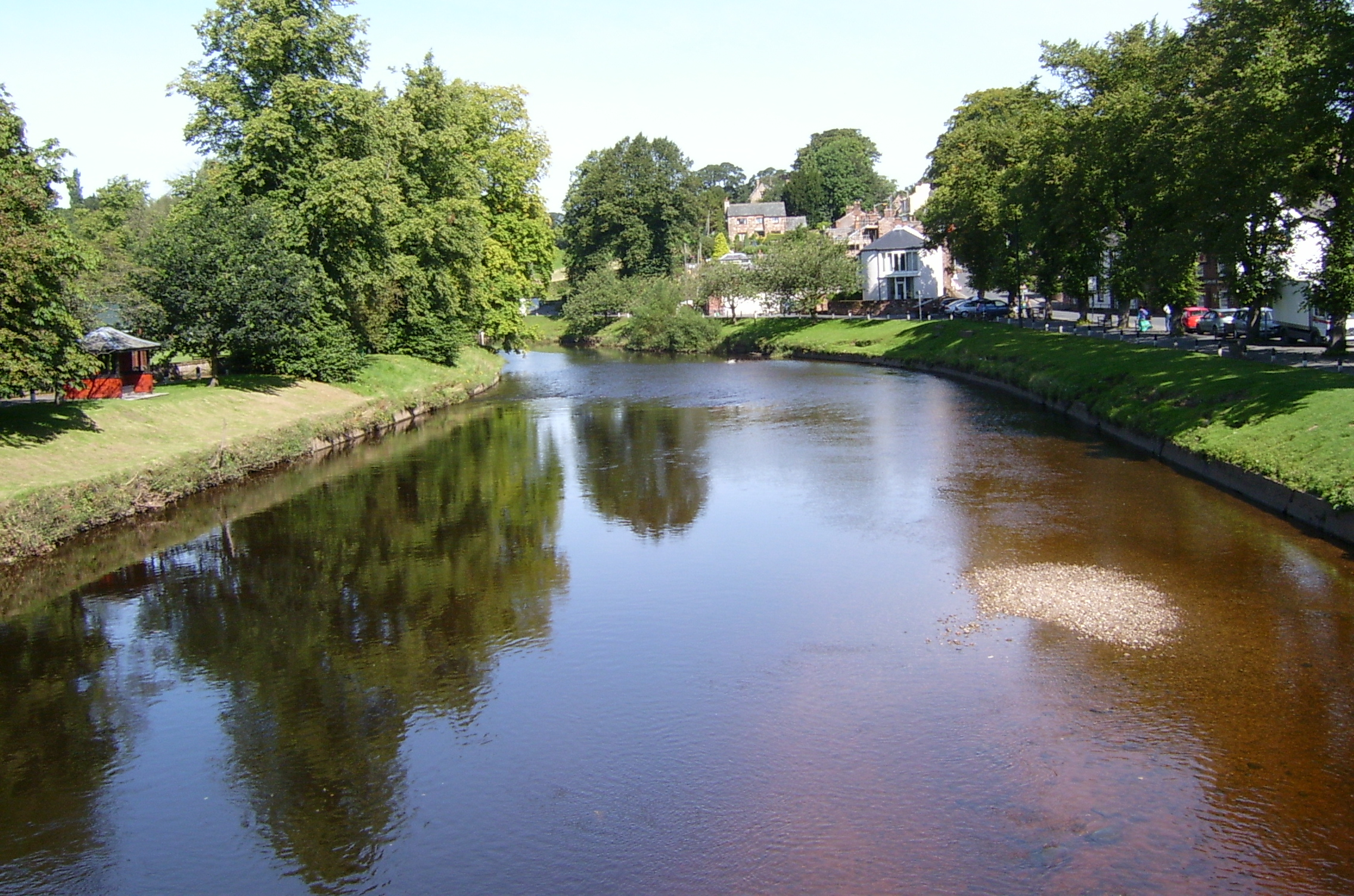 L'Eden, une rivière de Cumbrie